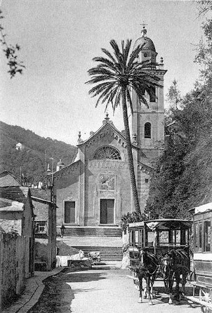 Immagine di fine Ottocento e inizio Novecento della chiesa di San Martino, Portofino, Liguria, Italia